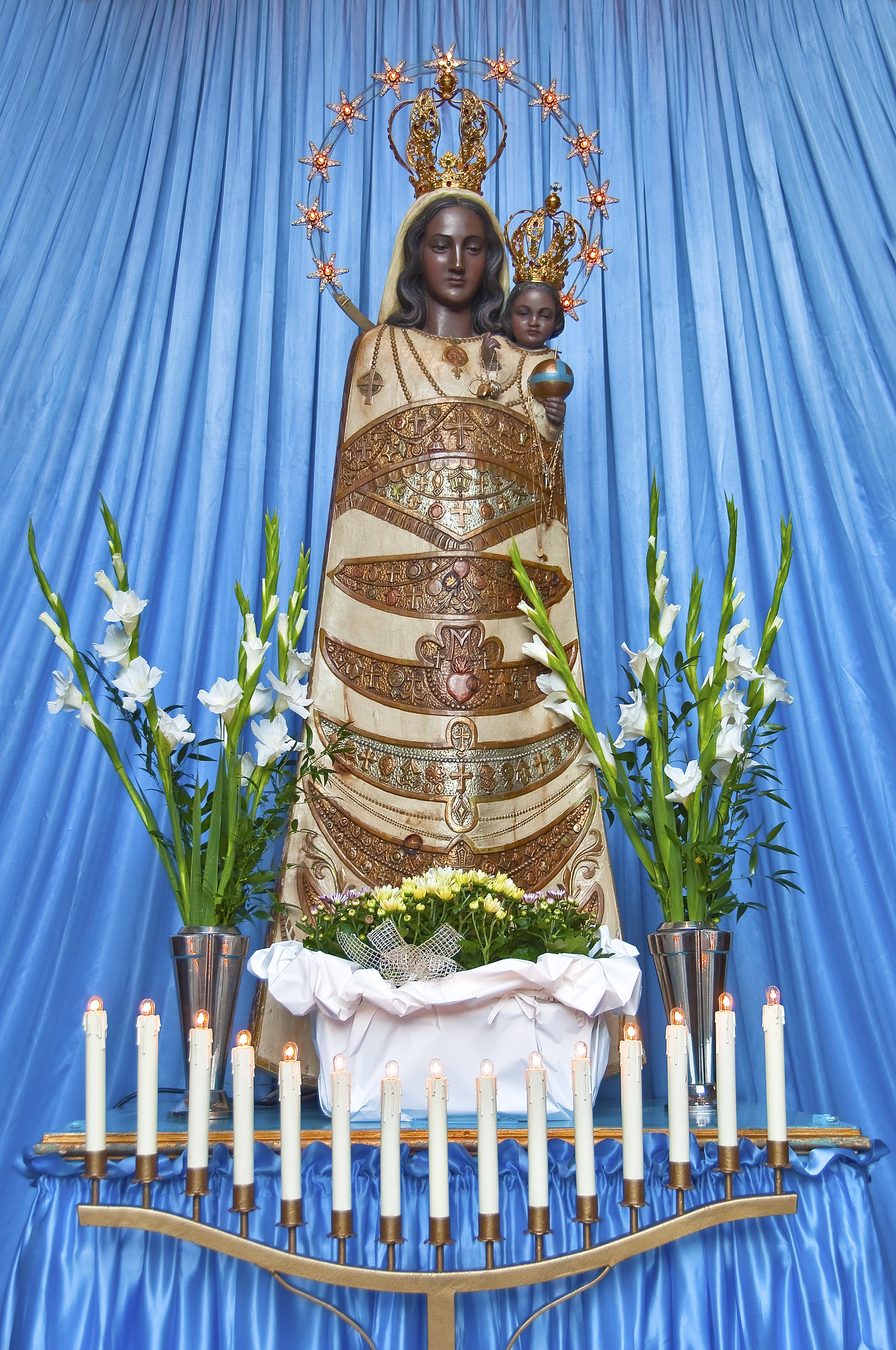 Lanzo Torinese, Santuario della Madonna di Loreto This is a photo of a monument which is part of cultural heritage of Italy.